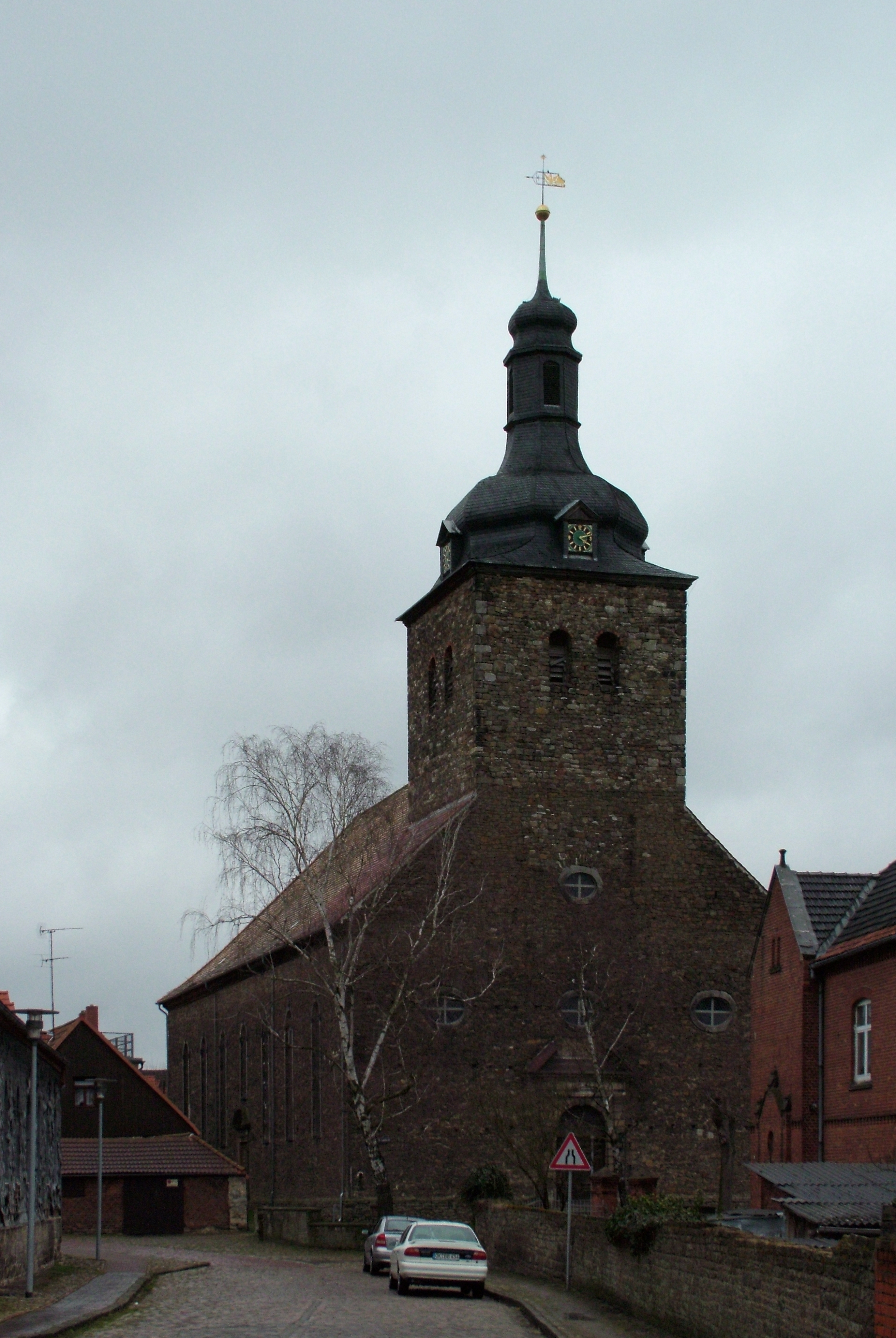 Die evangelische Dorfkirche in Weferlingen. Patronat ist St. Lamberti.